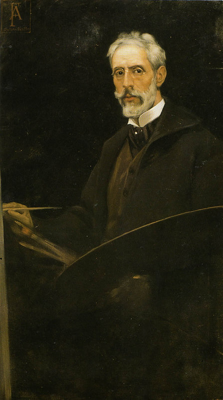 Self-portrait